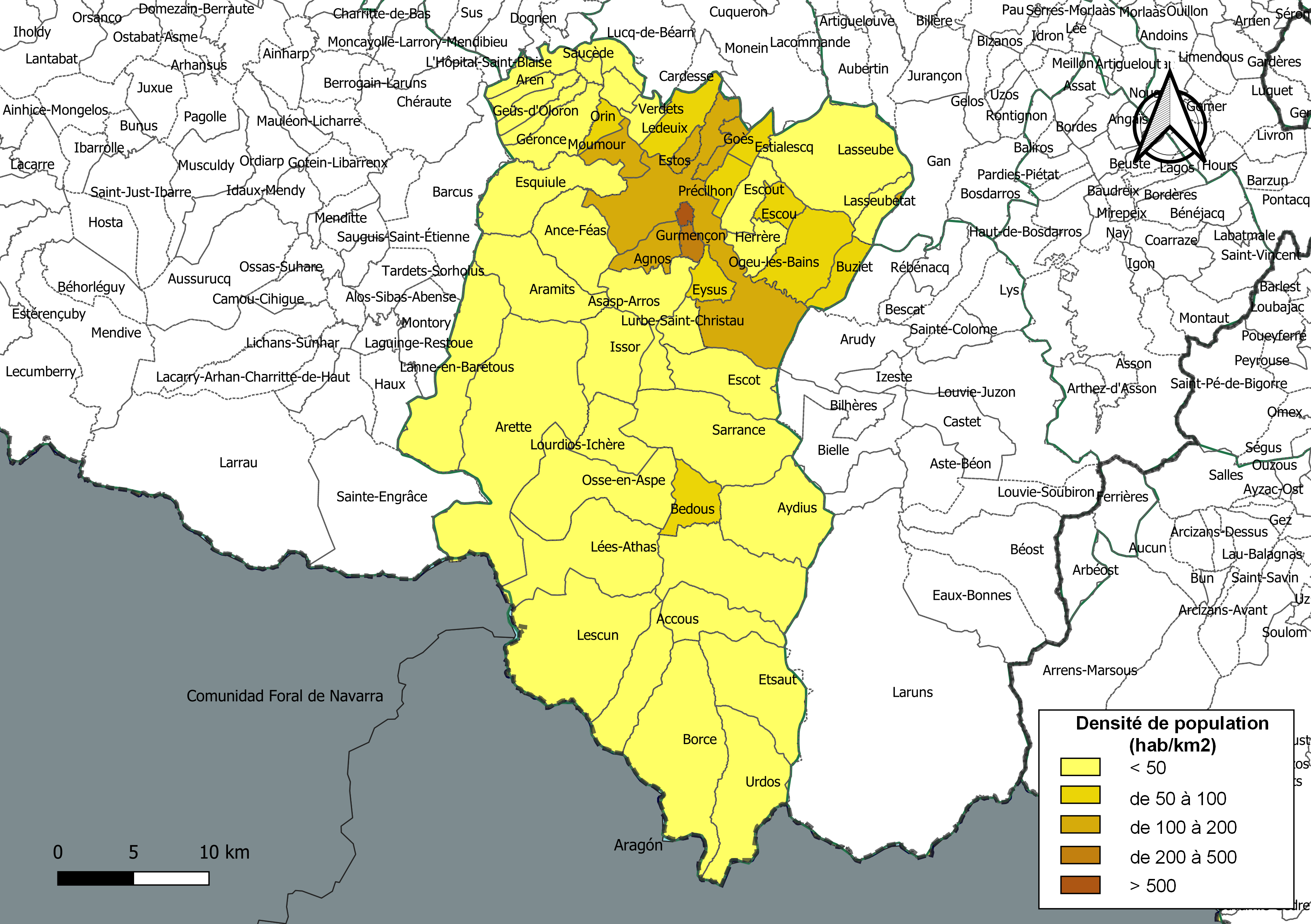 Carte des densités de population (millésimée 2016) des communes de la Communauté de communes du Haut Béarn, département des Pyrénées-Atlantiques, France. Composition au 1er janvier 2019.